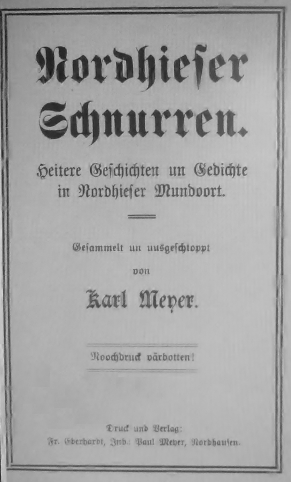 Karl Meyer: Nordhieser Schnurren, Verlag Eberhardt Nordhausen, etwa 1910